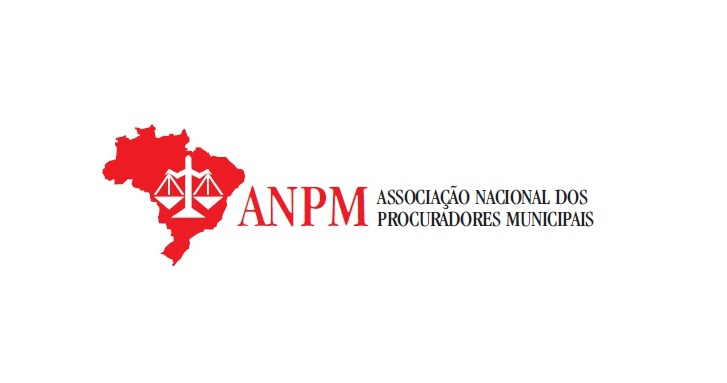 ANPM LOGOS